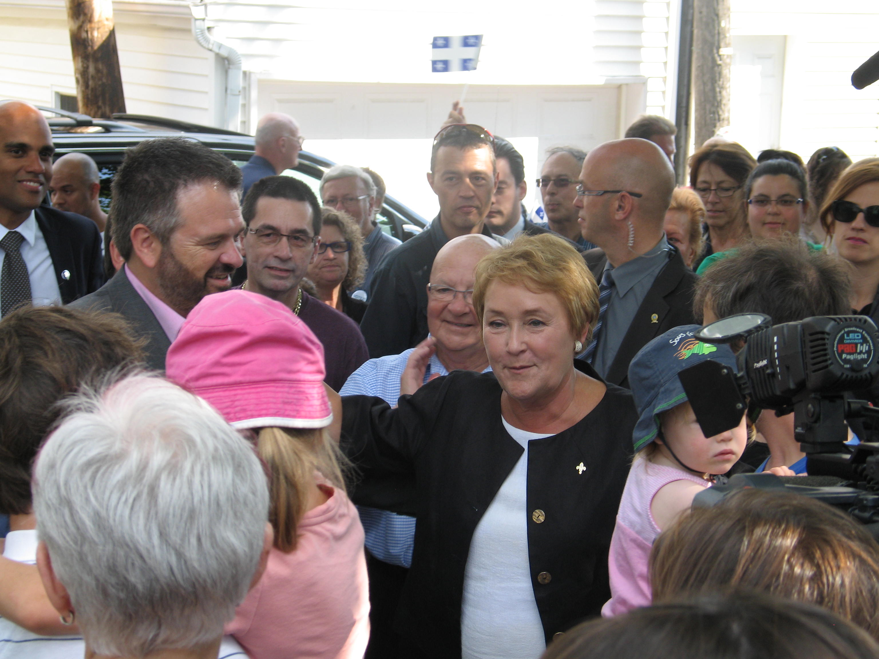 Pauline Marois participe à un événement partisan dans le quartier Limoilou de Québec à la veille de l'élection générale québécoise de 2012.